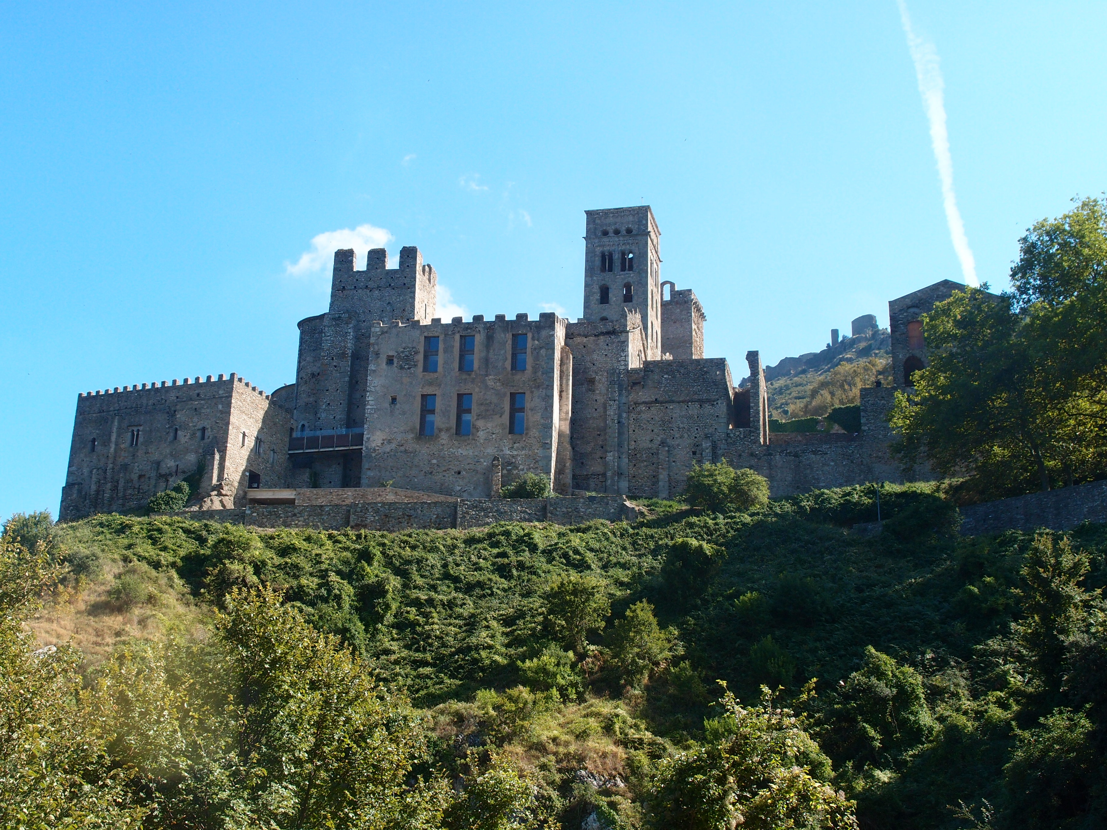 Kloster Sant Pere de Rodes (Alt Emporda / Katalonien) Datum: 14.09.2013 Urheber: M. Pfeiffer alias Gordito1869 Quelle: privates Fotoarchiv des Urhebers